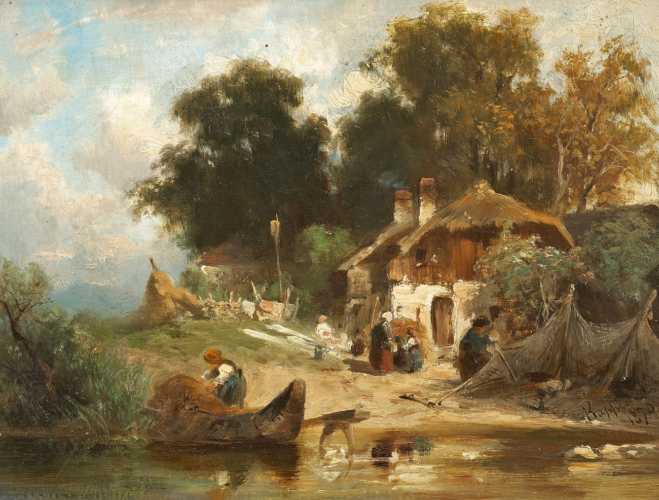 Fischerhäuser an einem Seeufer. Signiert und datiert unten rechts: Kappis 1890. Öl auf Holz. 19 x 26 cm.